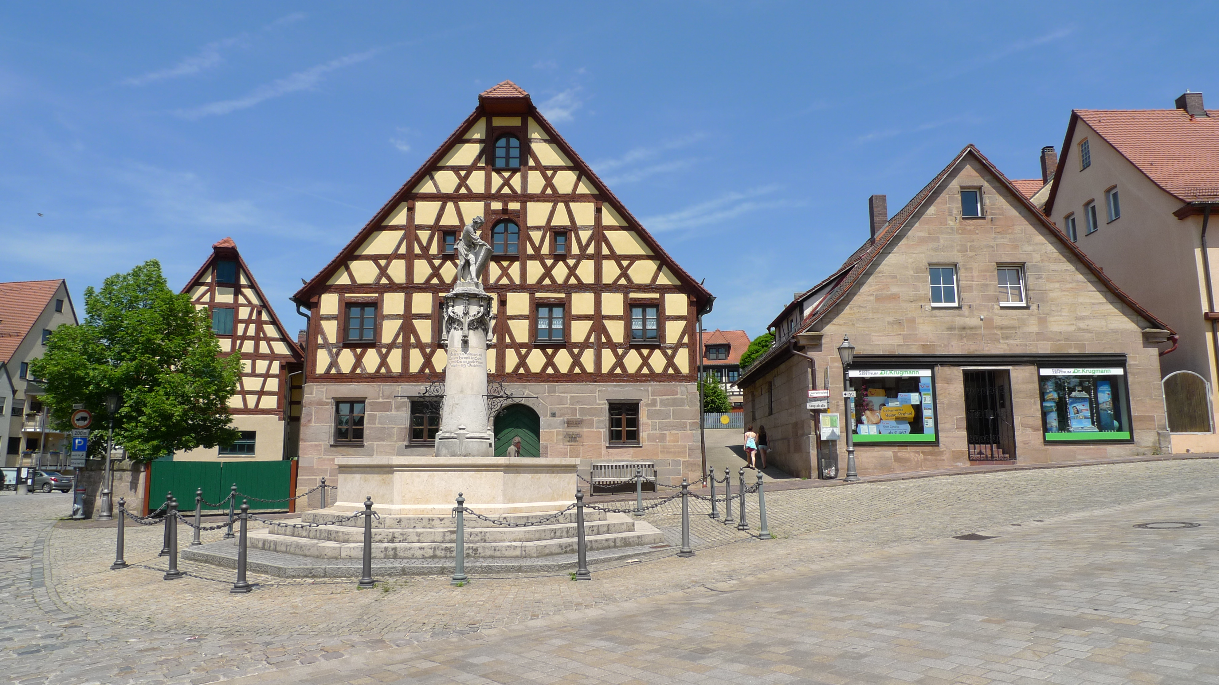 Der Wendenbrunnen im Ortszentrum von Wendelstein (Mittelfranken)